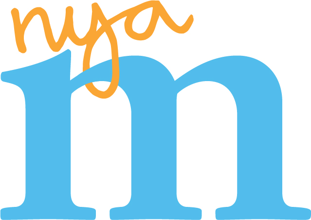 Nya moderaternas vallogotyp